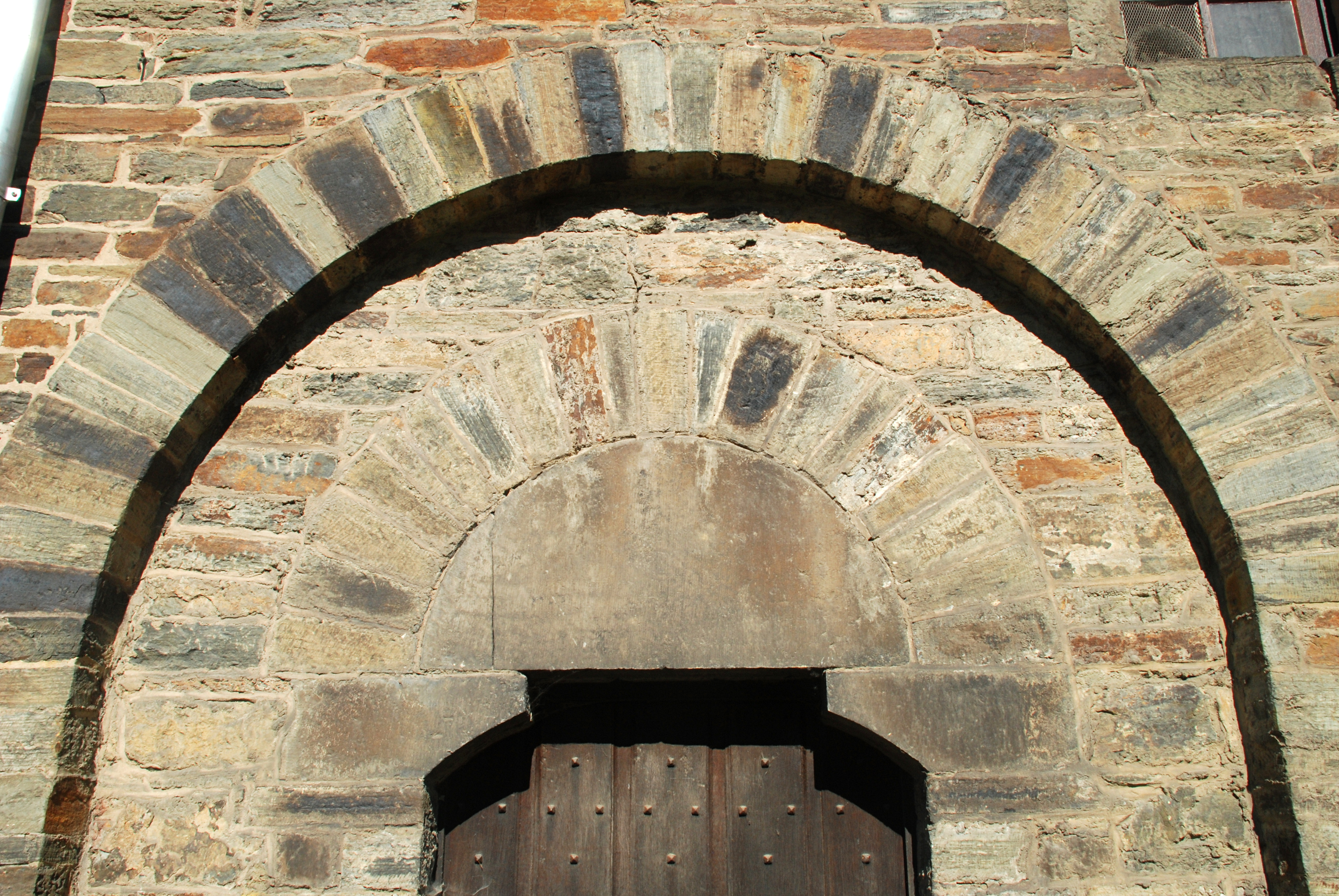 Belgique- Brabant wallon - Villers-la-Ville - ancien moulin abbatial